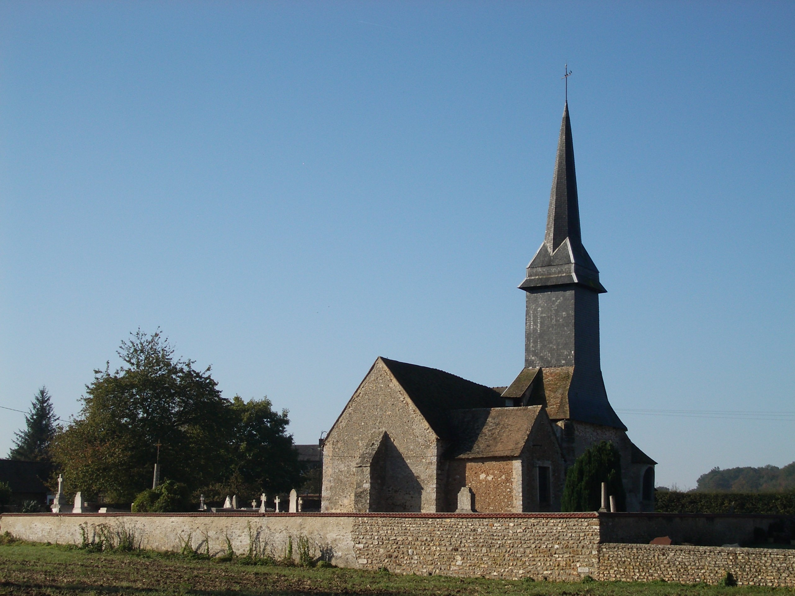 Eglise Saint Pierre - Houlbec-Cocherel (Eure)